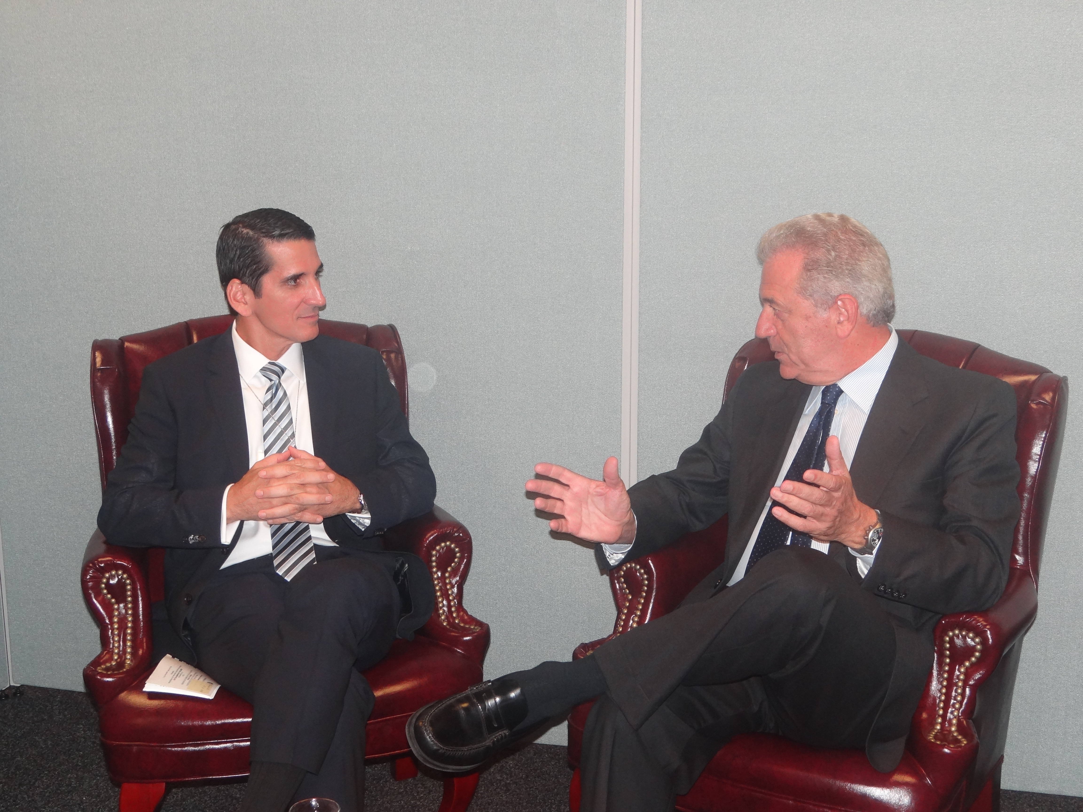 Συνάντηση ΥΠΕΞ Δ. Αβραμόπουλου με ΥΠΕΞ Παναμά Rómulo Roux